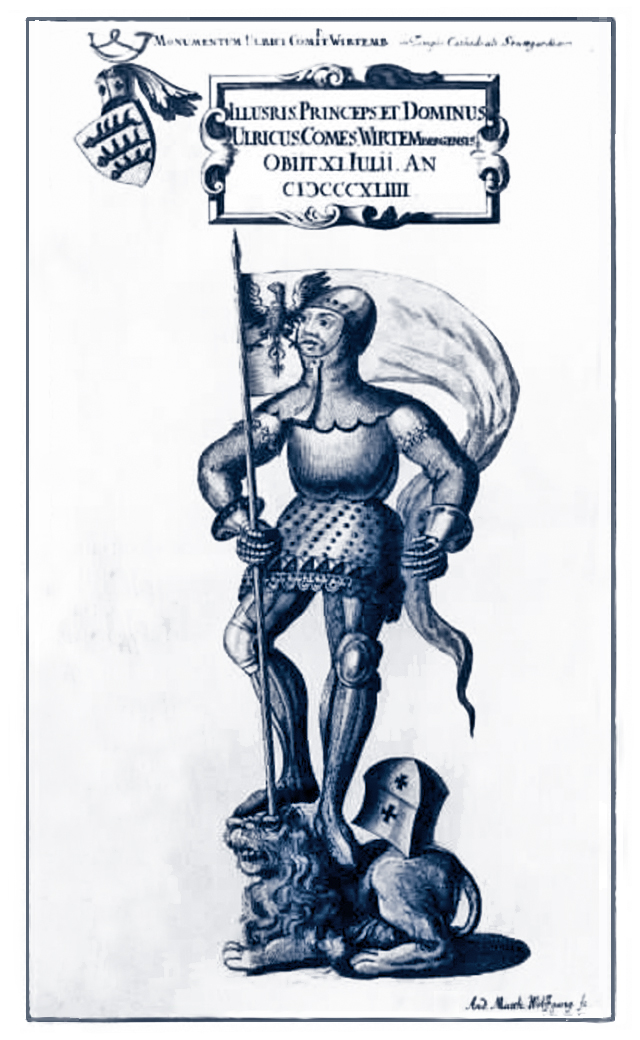 Graf Ulrich III. von Württemberg (1292–1344) mit Reichssturmfahne – nach der Belehnung (1336) mit Grüningen und der Reichssturmfahne (schwarzer Adler auf goldenem Grund an roter Stange) – Kupferstich